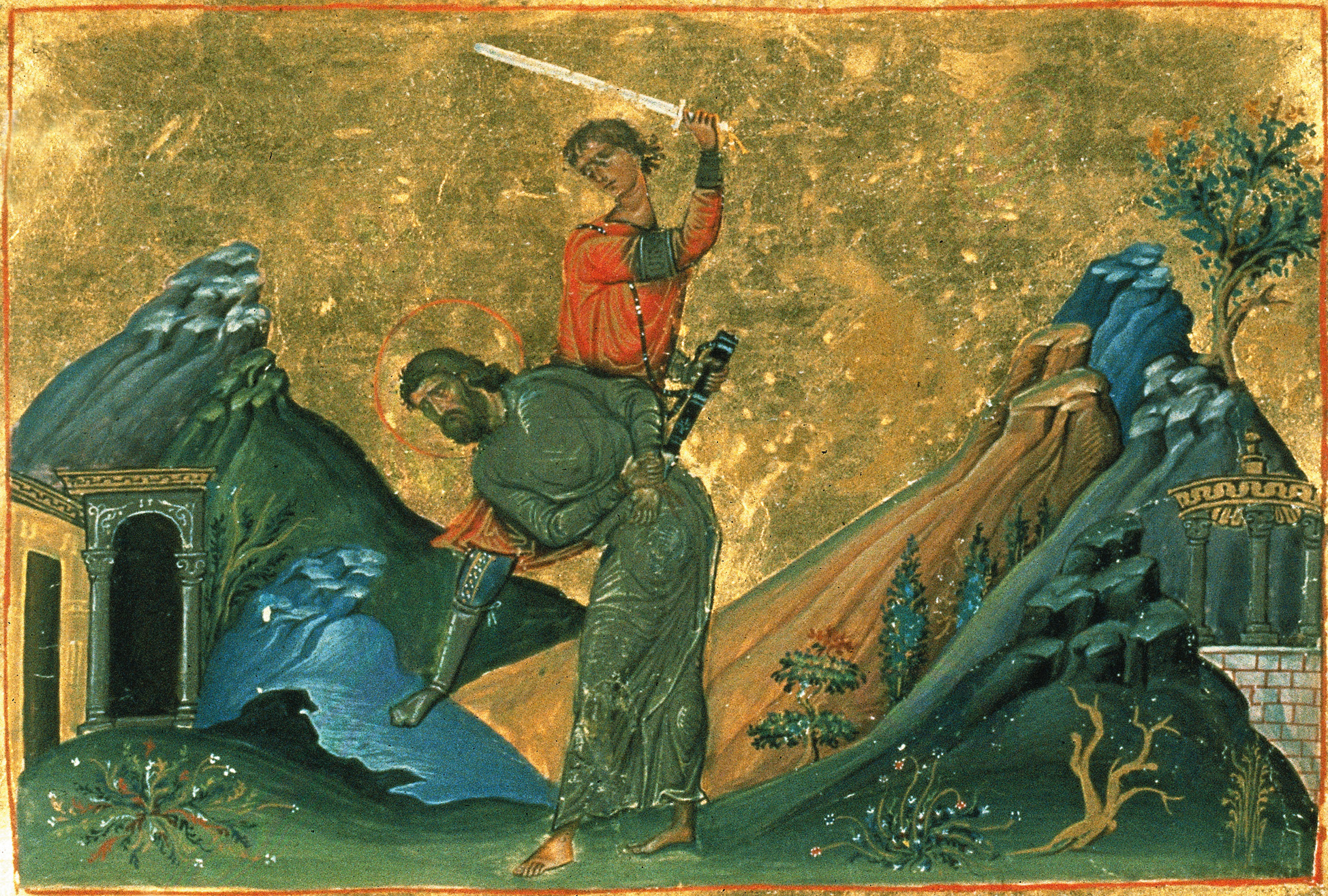 Епимах Новый, Александрийский, мч. Миниатюра Минология Василия II. Константинополь. 985 г. Ватиканская библиотека. Рим